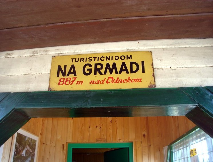 Napis nad vrati doma na Grmadi, Mala gora